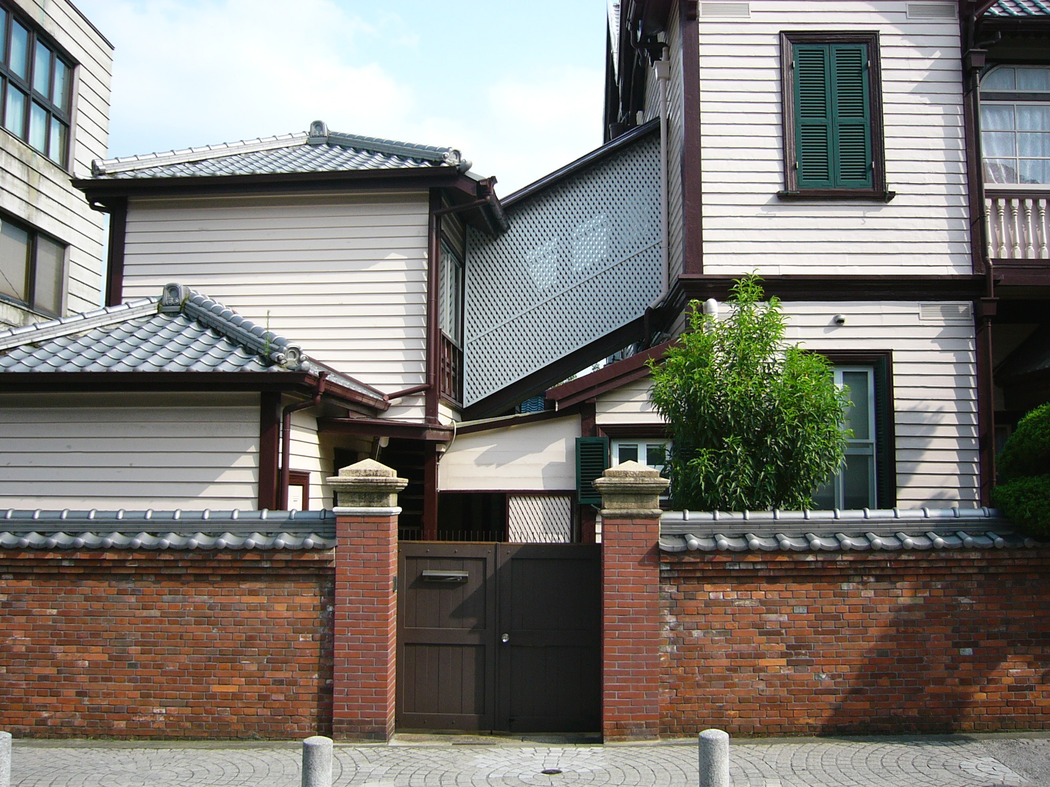 門邸，兵庫県神戸市中央区